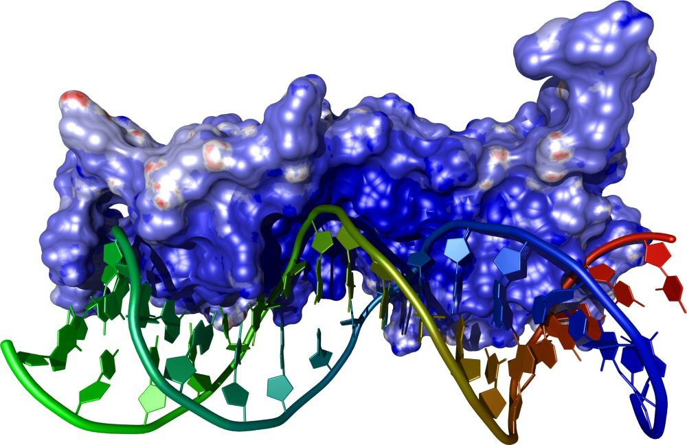 Glucocorticoid Rezeptor (PDB ID: 1GLU) gebunden an seinem DNA Gegenstück). Die Oberfläche des Proteins wurde nach seiner Elektrostatik gefärbt. Erstellt mit BALLView.